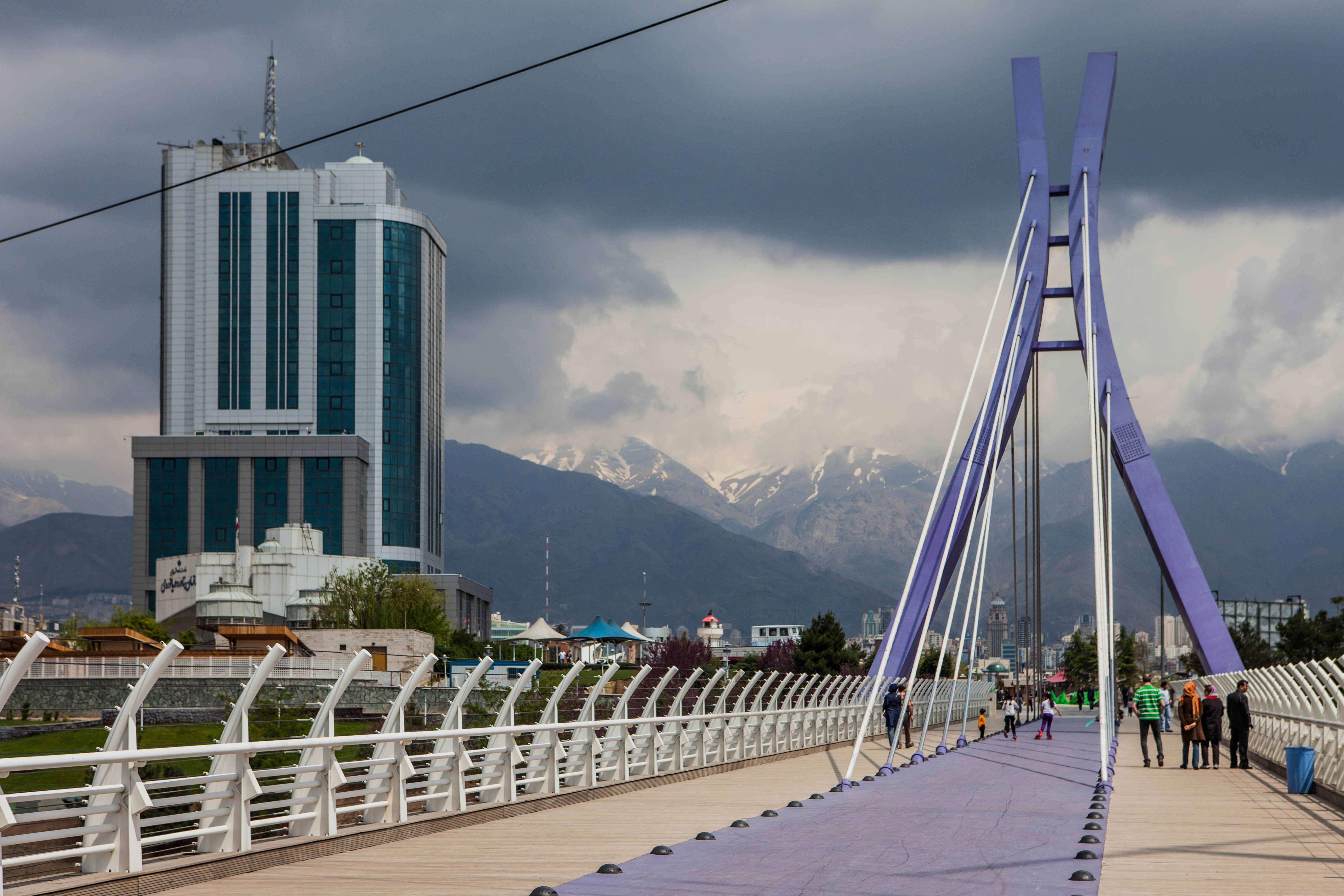 Silk Bridge (Pol e Abrisham), Tehran, Iran